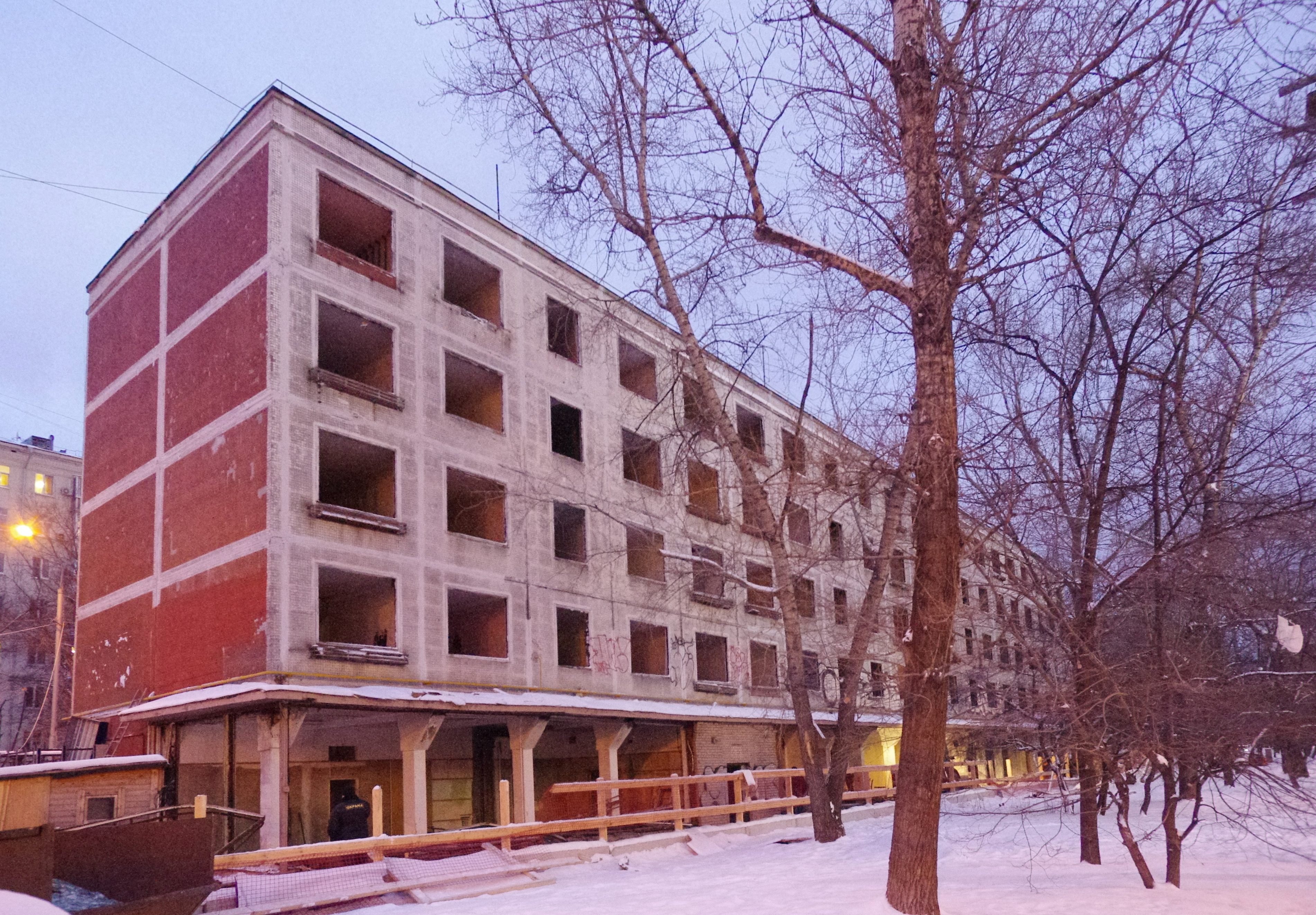 Пятиэтажки в Марьиной Роще